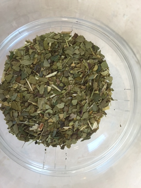 Српски (ћирилица): Мате чај